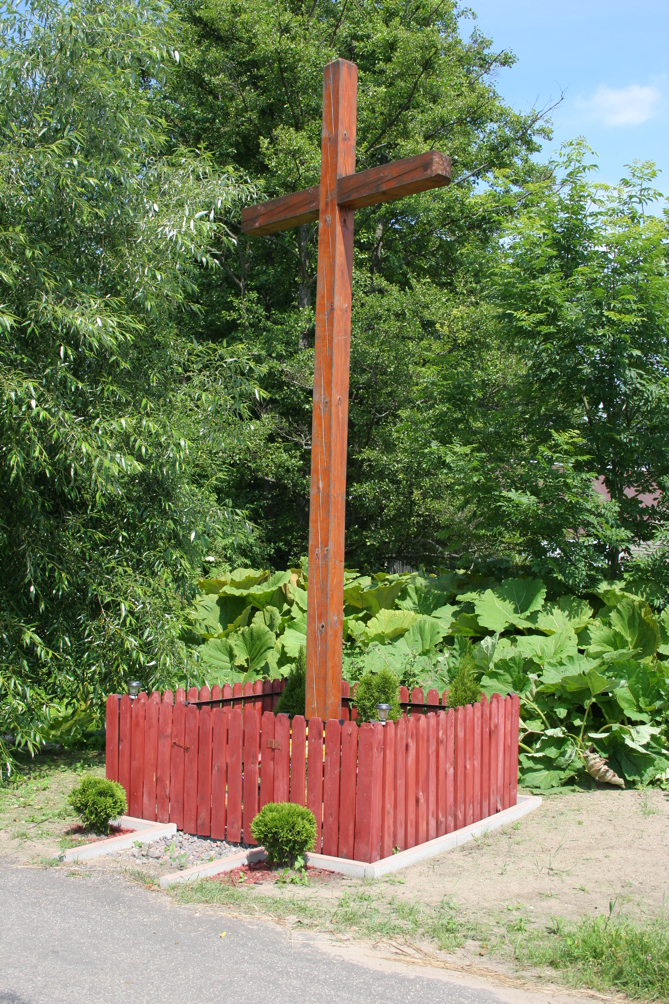 Krzyż w Bachurach.